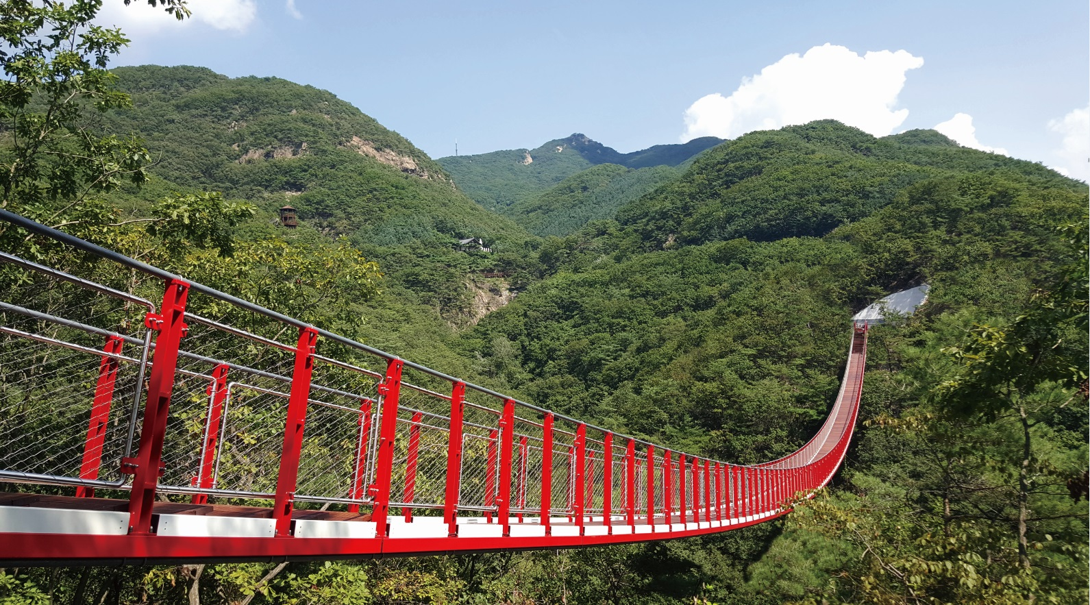 감악산 출렁다리의 전경